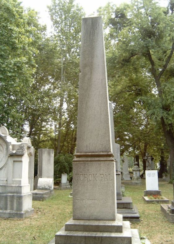 Török Pál (Alsóvárad, 1808. június 29. – Budapest, 1883. október 7.) református püspök sírja Budapesten. Kerepesi temető: 34/1-1-20 [kivitelező: Gerenday-cég].